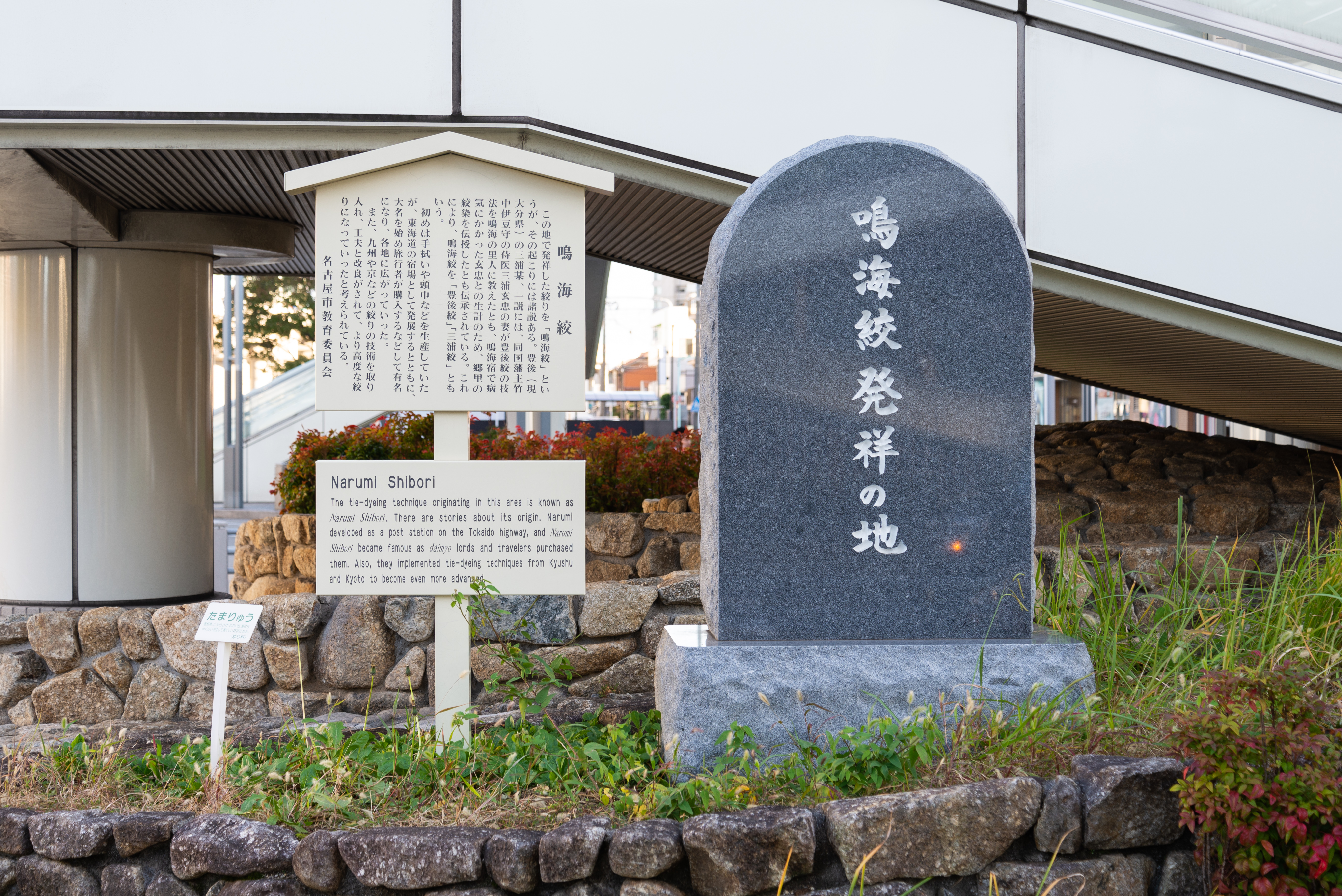 愛知県名古屋市緑区の鳴海駅前にある鳴海絞発祥の地を示す石碑